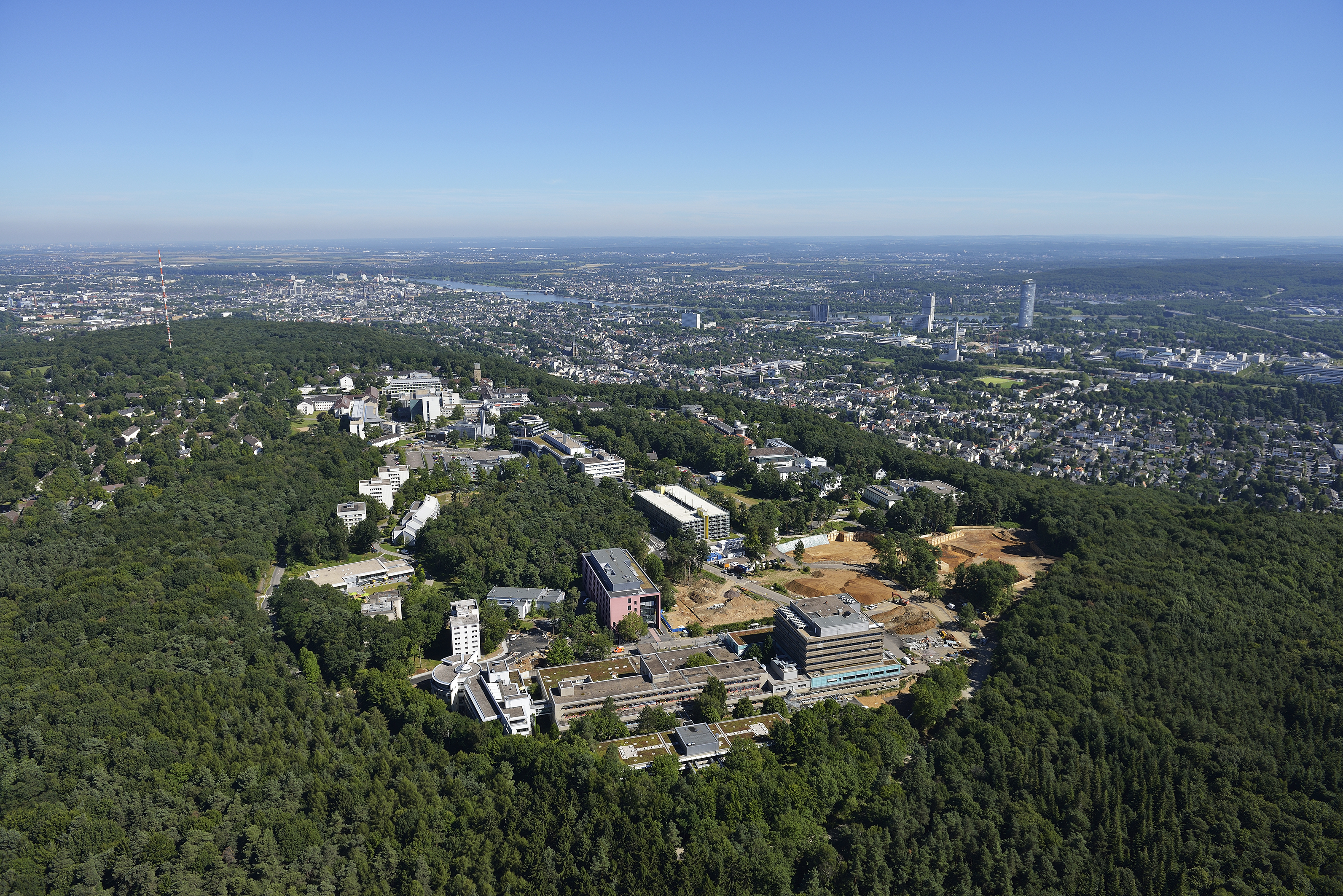 Gesamtansicht Universitätsklinikum Bonn